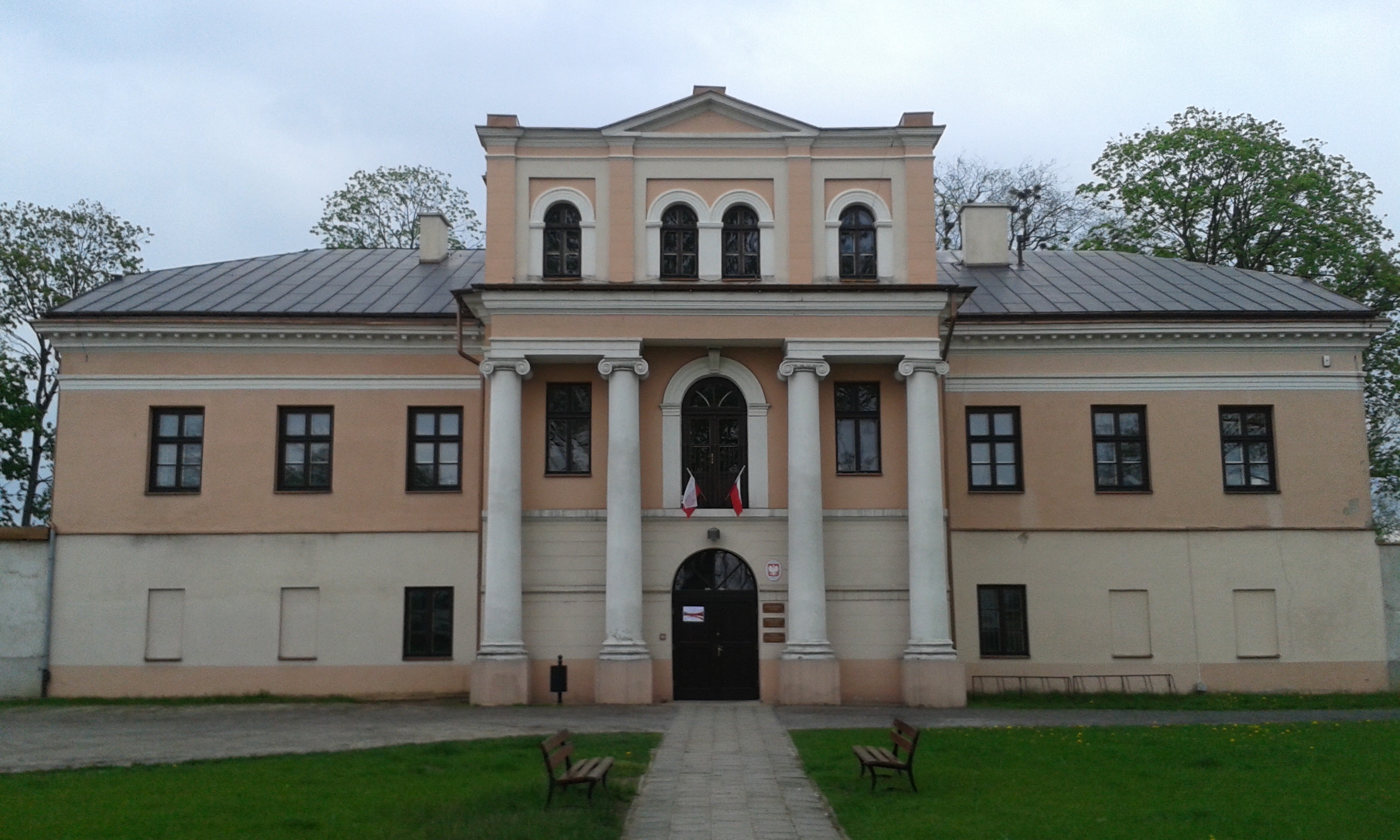 Wejście główne